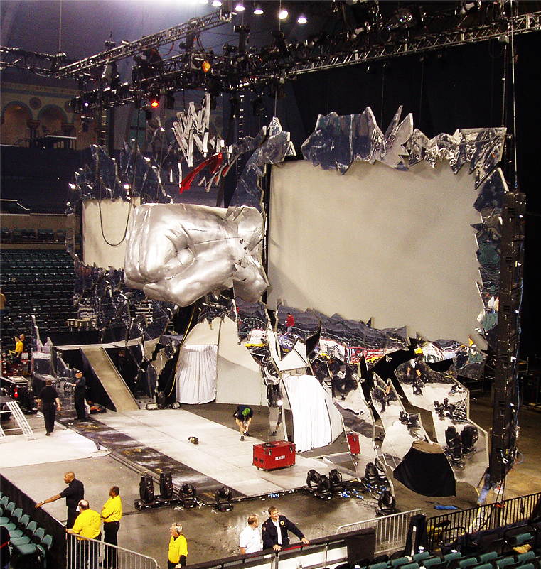 SmackDown Stage 2005